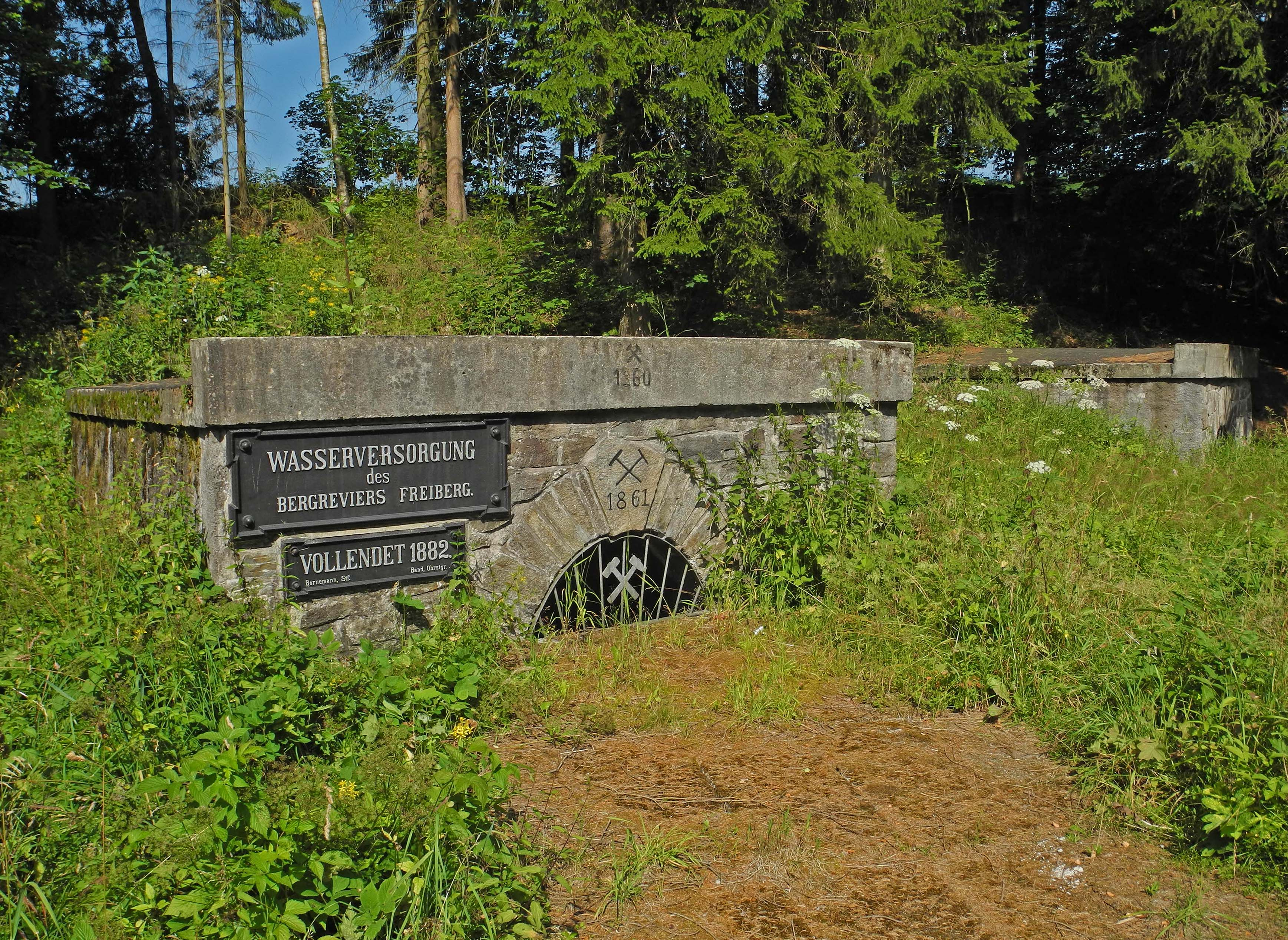 Revierwasserlaufanstalt Freiberg: Mundloch der II. Cämmerswalder Rösche (1861). Tafeln auf Grund des Baues der Talsperre Rauschenbach 1960 hier angebracht.